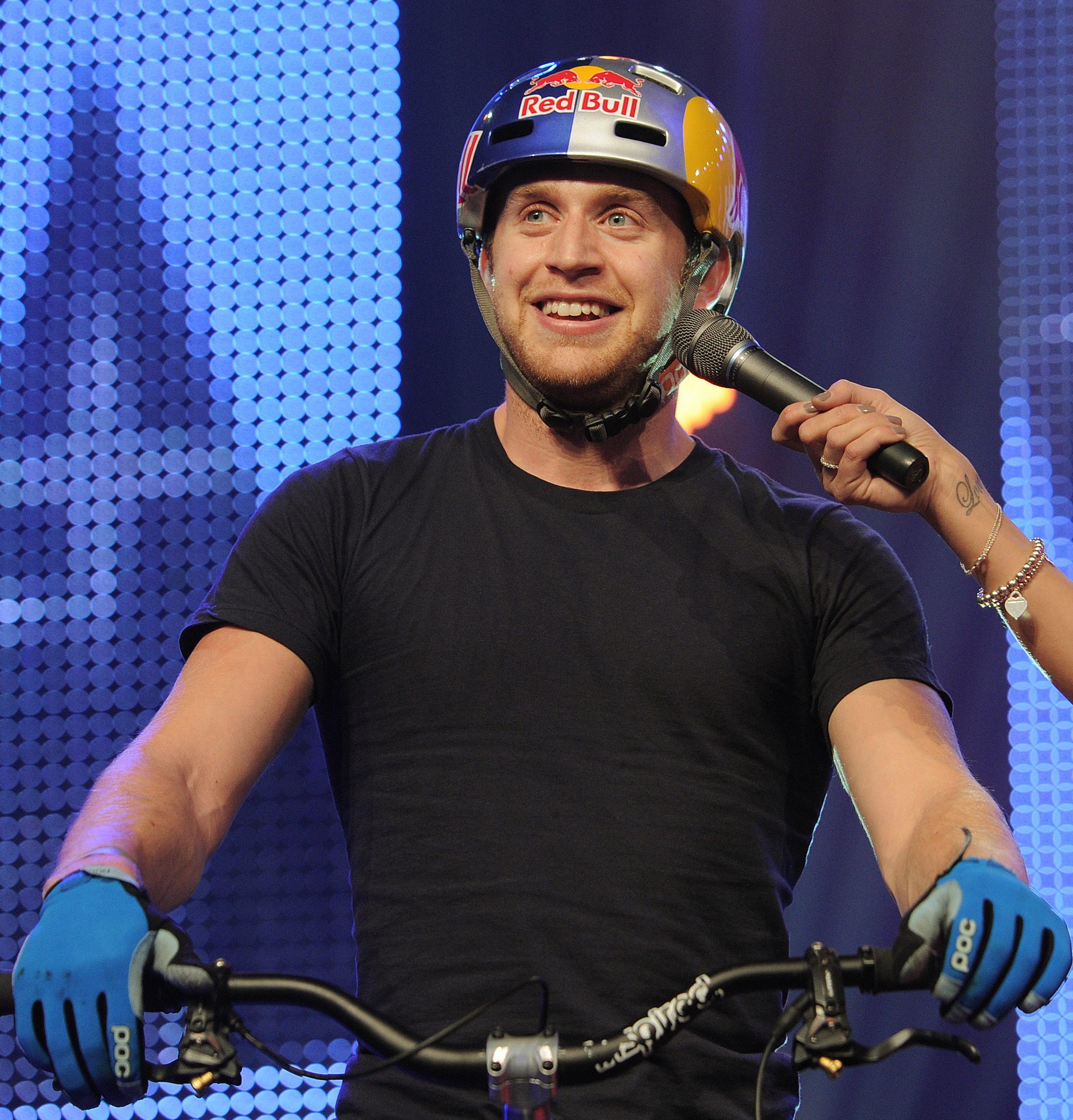 Davos, 15.11.2013. Sport, 11. Internationale Sportnacht Davos 2013. Moderatorin Christa Rigozzi und der Bike-Trial-Star Danny MacAskill.. . Copyright by: foto-net / Kurt Schorrer